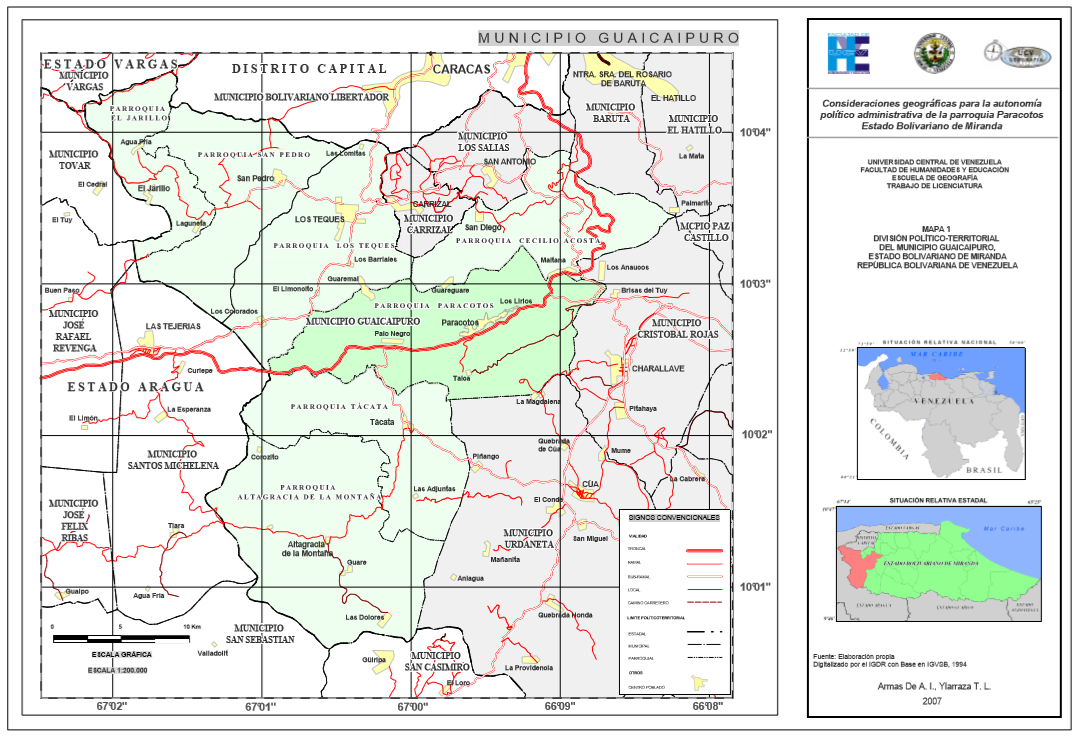 MAPA 1 DIVISIÓN POLÍTICO-TERRITORIAL DEL MUNICIPIO GUAICAIPURO, ESTADO BOLIVARIANO DE MIRANDA REPÚBLICA BOLIVARIANA DE VENEZUELA